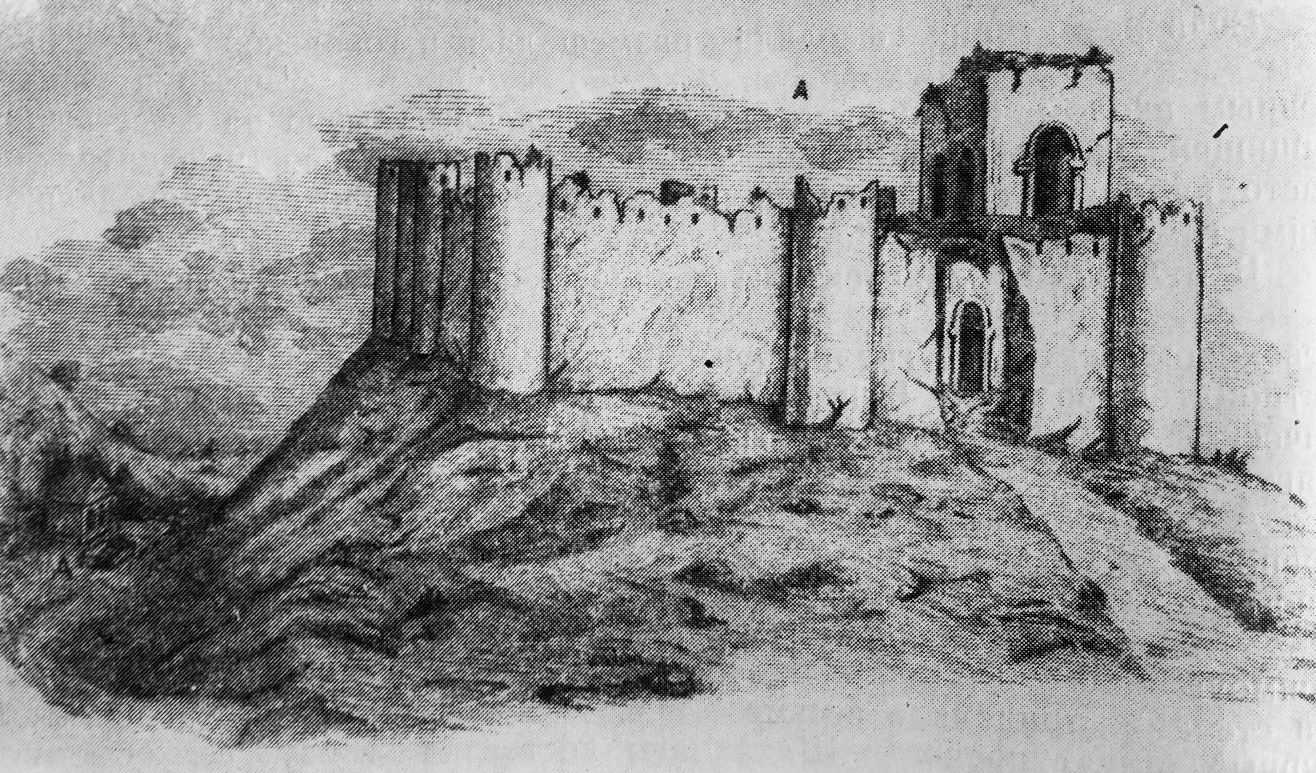 Замок Шахбулаг. Вид замка с южной стороны. Зарисовка русского военного историка В.Потто.